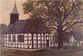 Die Oppenwehr Klus (Gemälde)